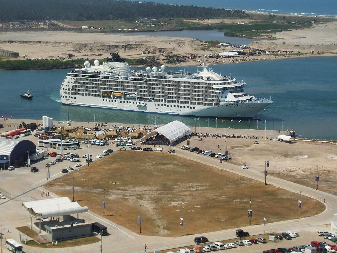 Llegada de el crucero "The World" al puerto de Dos Bocas en febrero de 2009, siendo el primer crucero turístico en arribar a Tabasco.